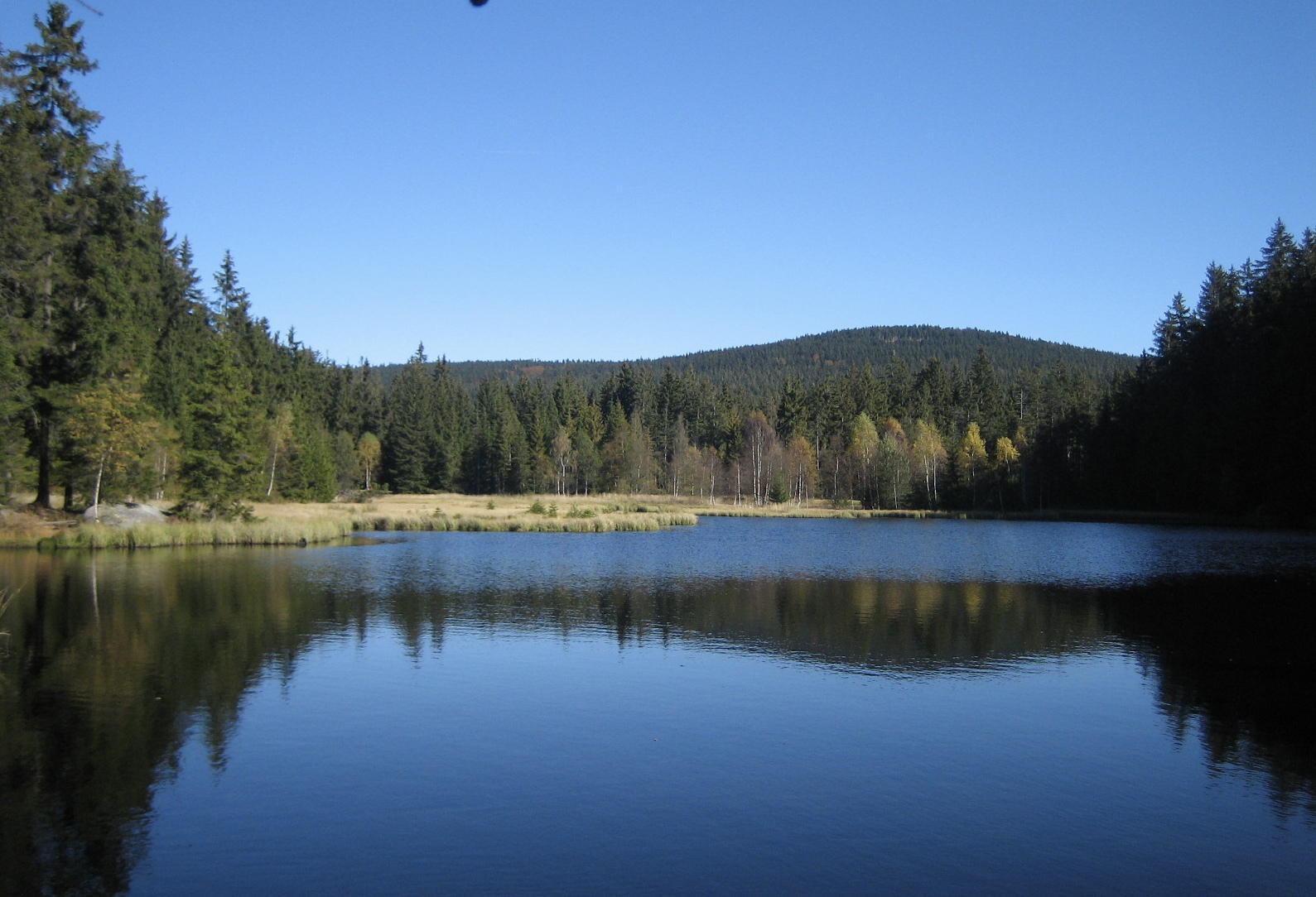 Nordteil des Fichtelsees im Naturschutzgebiet „Naturwaldreservat Fichtelseemoor“